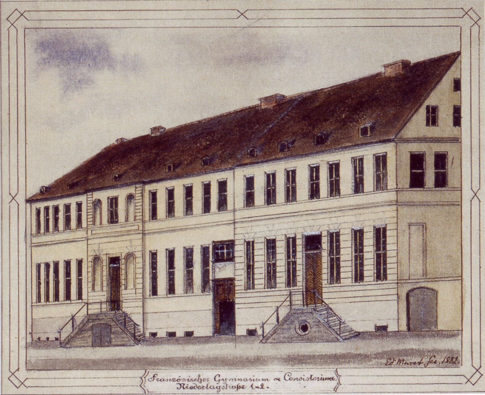 Franzoesisches Gymnasium (i. e. French Grammar School). Berlin.